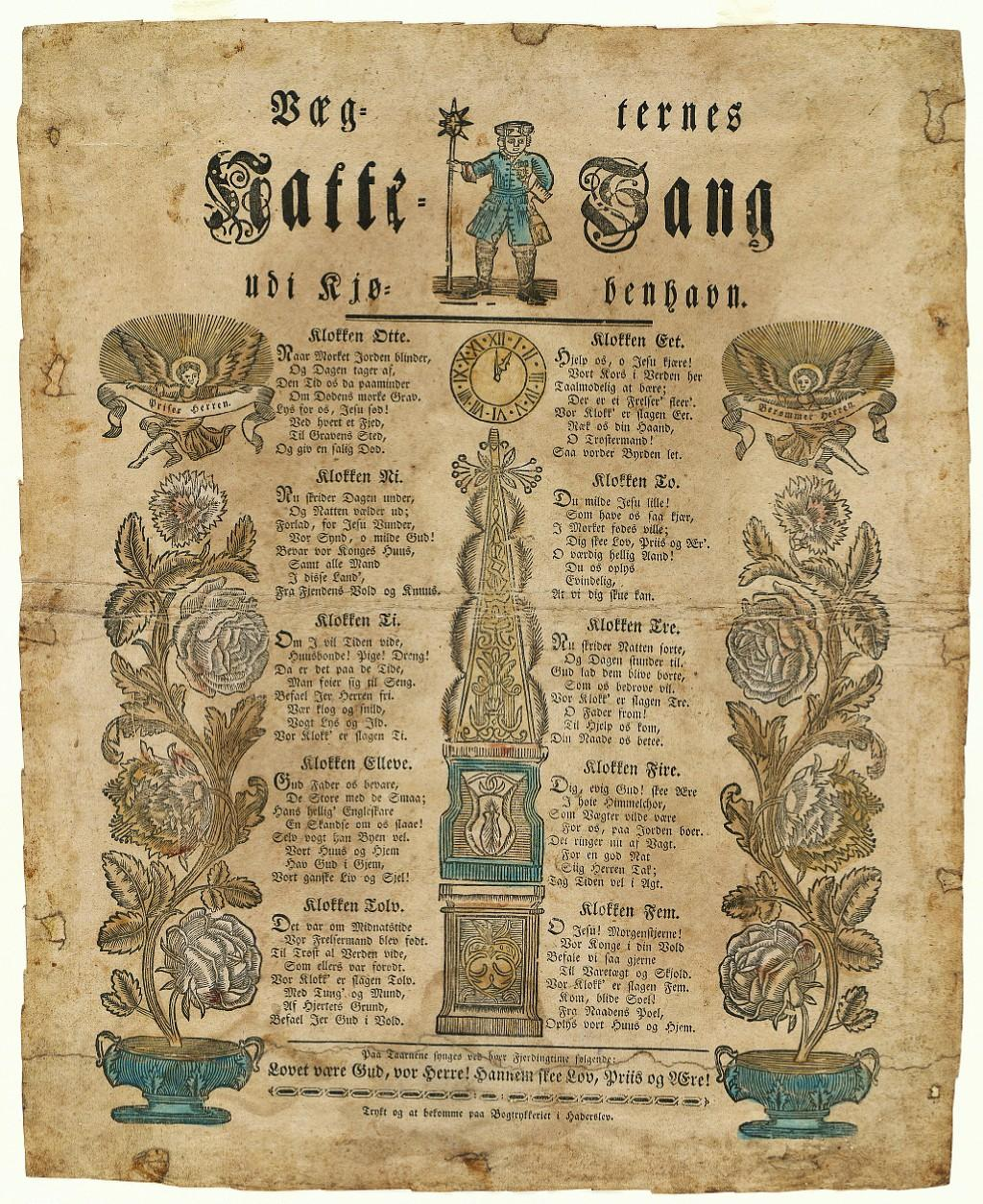 Væg=ternes Natte=Sang udi Kjøbenhavn. Fra ca. 1825